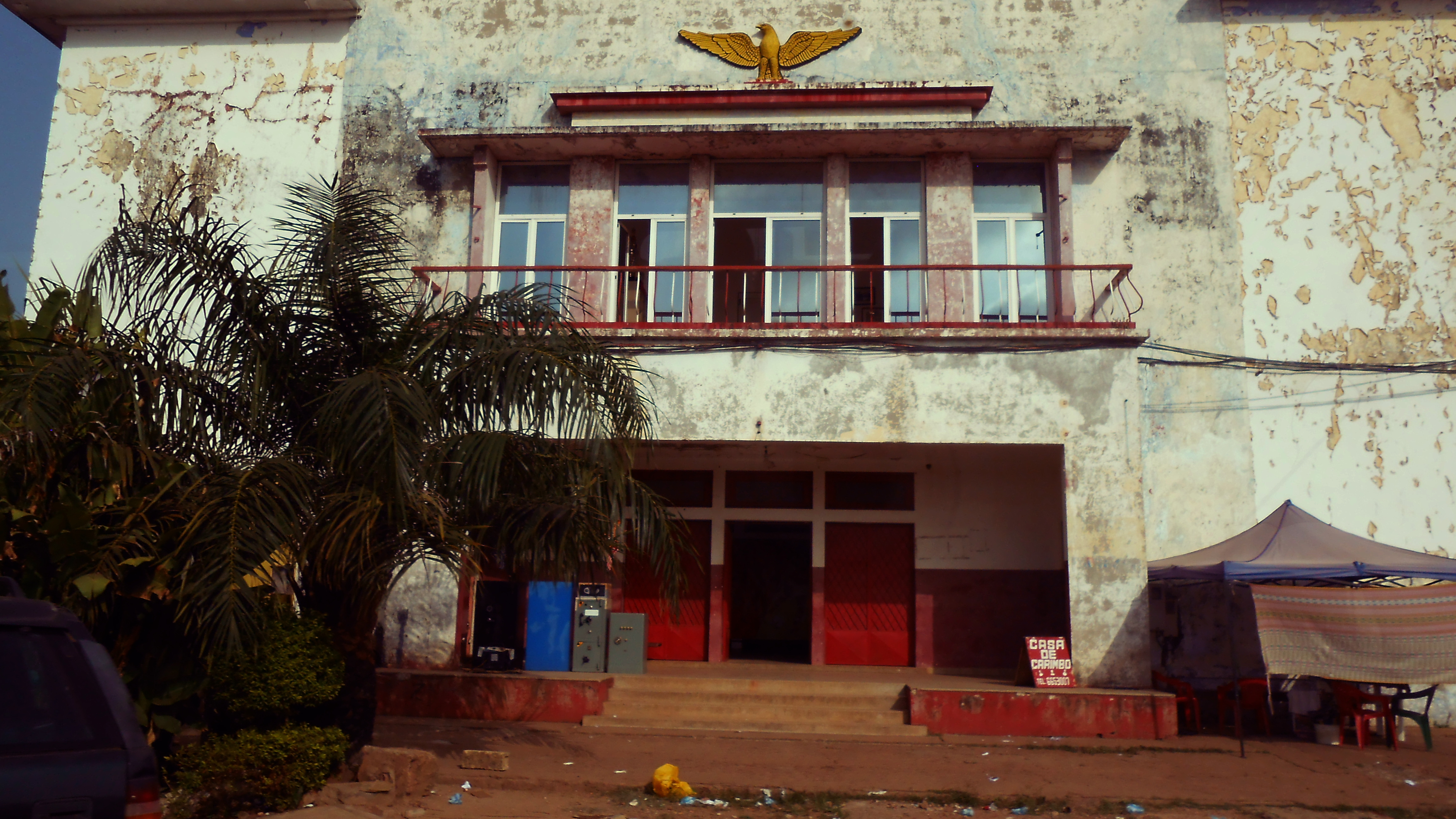 A Casa do Benfica no centro de Bissau.